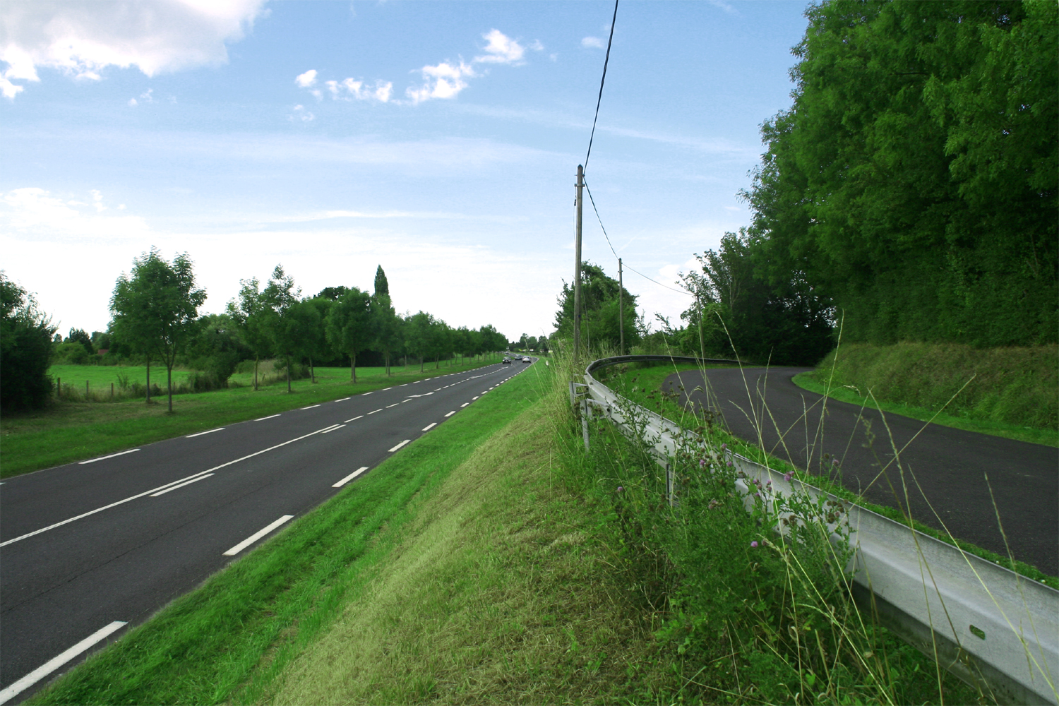 la route départemental 400 reliant l'autoroute aux stations de Cabourg et d'Houlgate dans la commune de Brucourt à la hauteur de la route départementale 49